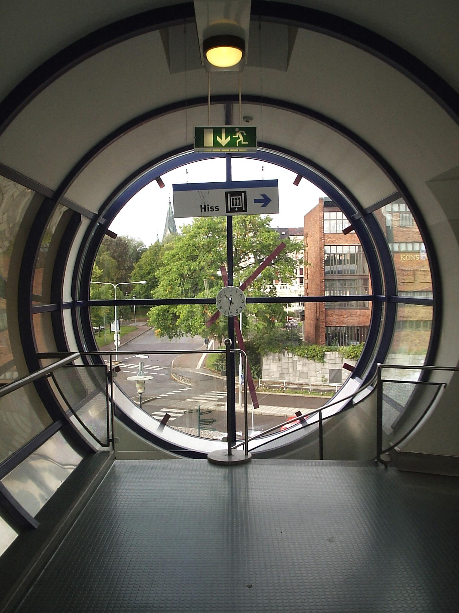 Bilden är fotograferad av Harri Blomberg. Photo by Harri Blomberg.